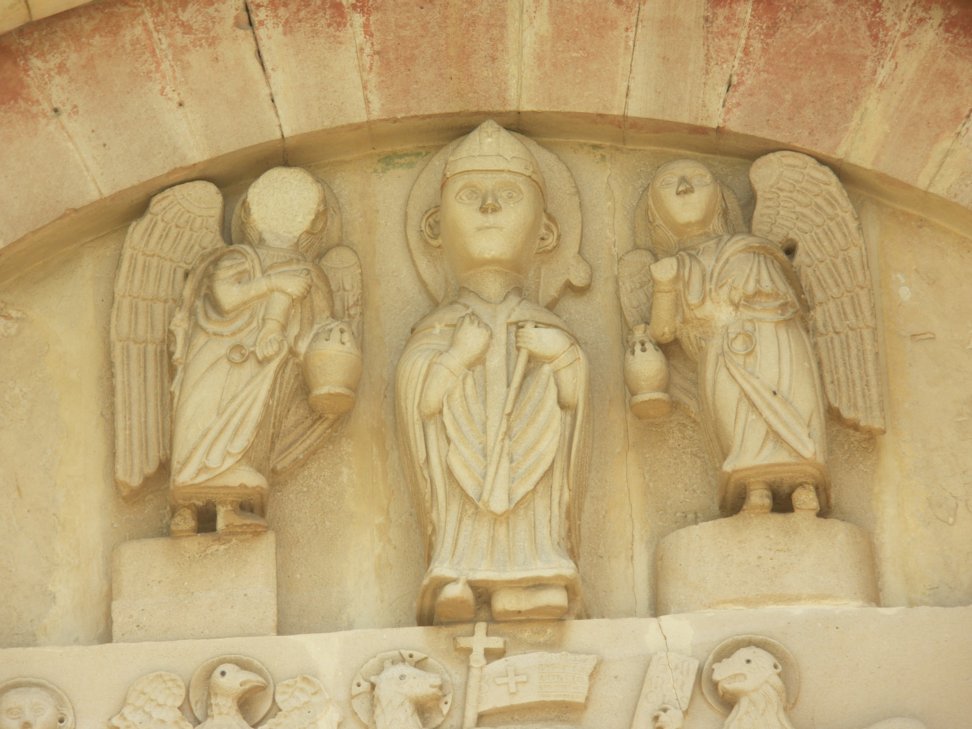 Cingoli, chiesa di Sant'Esuperanzio, lunetta con effige del santo vescovo